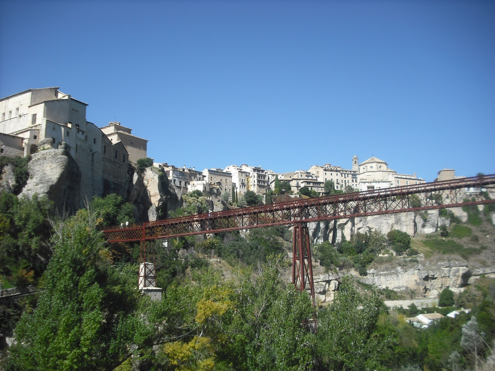 Puente de San Pablo de Cuenca.